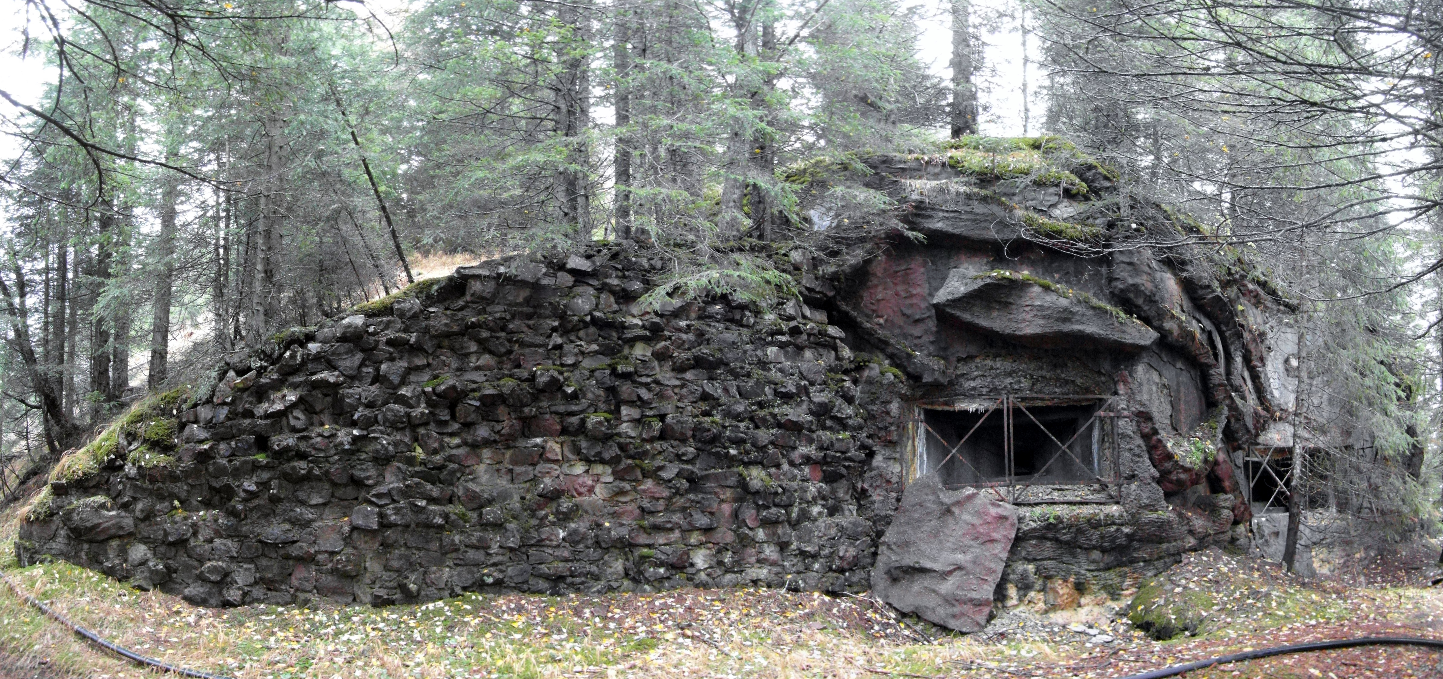 Opera 4 Passo Monte Croce di Comelico